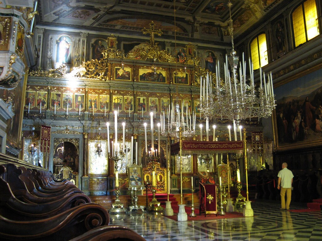 Interno della chiesa greco-ortodossa di San Nicolò a Trieste